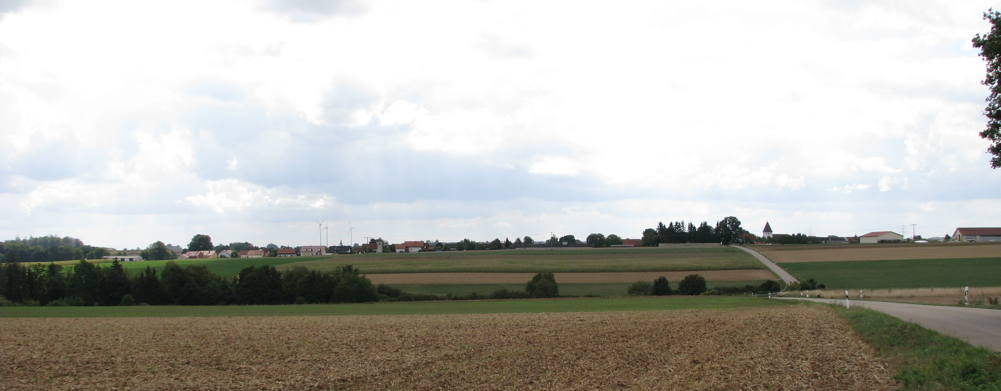 Kaldorf (Gemeinde Titting im Landkreis Eichstätt)